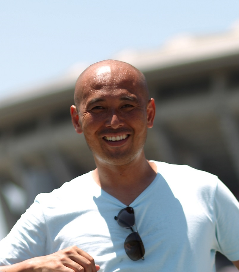 松原代表写真